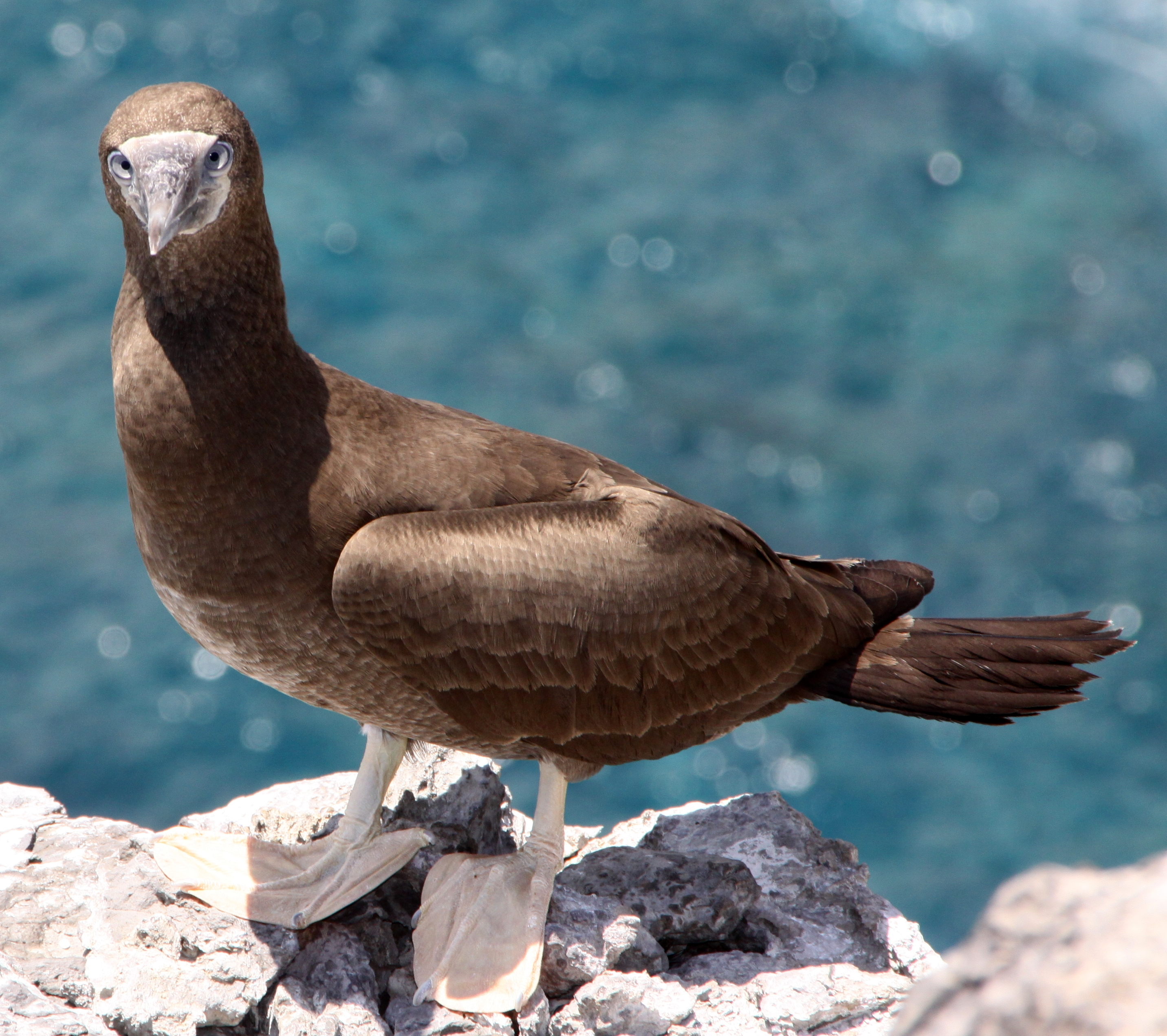 Letterbox Plateau